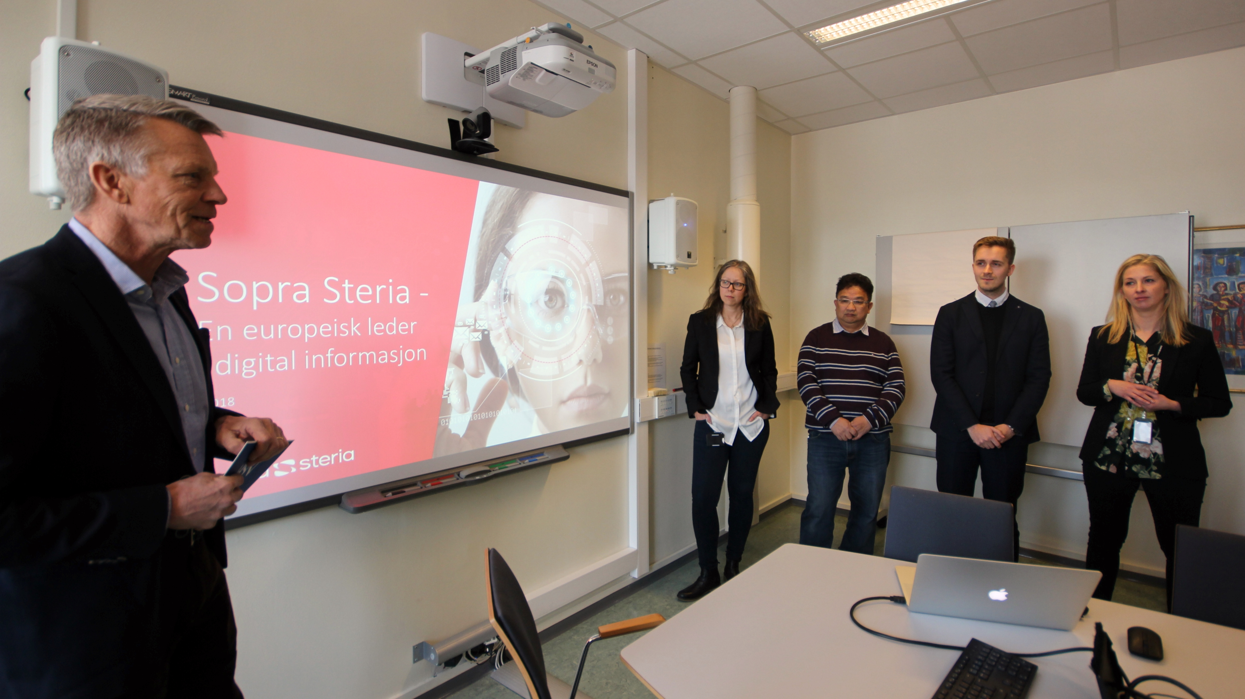 Theodor Henriksen (2. fra høyre) fra Sopra Steria signerer FoUI-avtale med daværende HSN, 1. mars 2018. Prorektor Nils Kristian Bogen til venstre. Foto: Stian Kristoffer Sande.